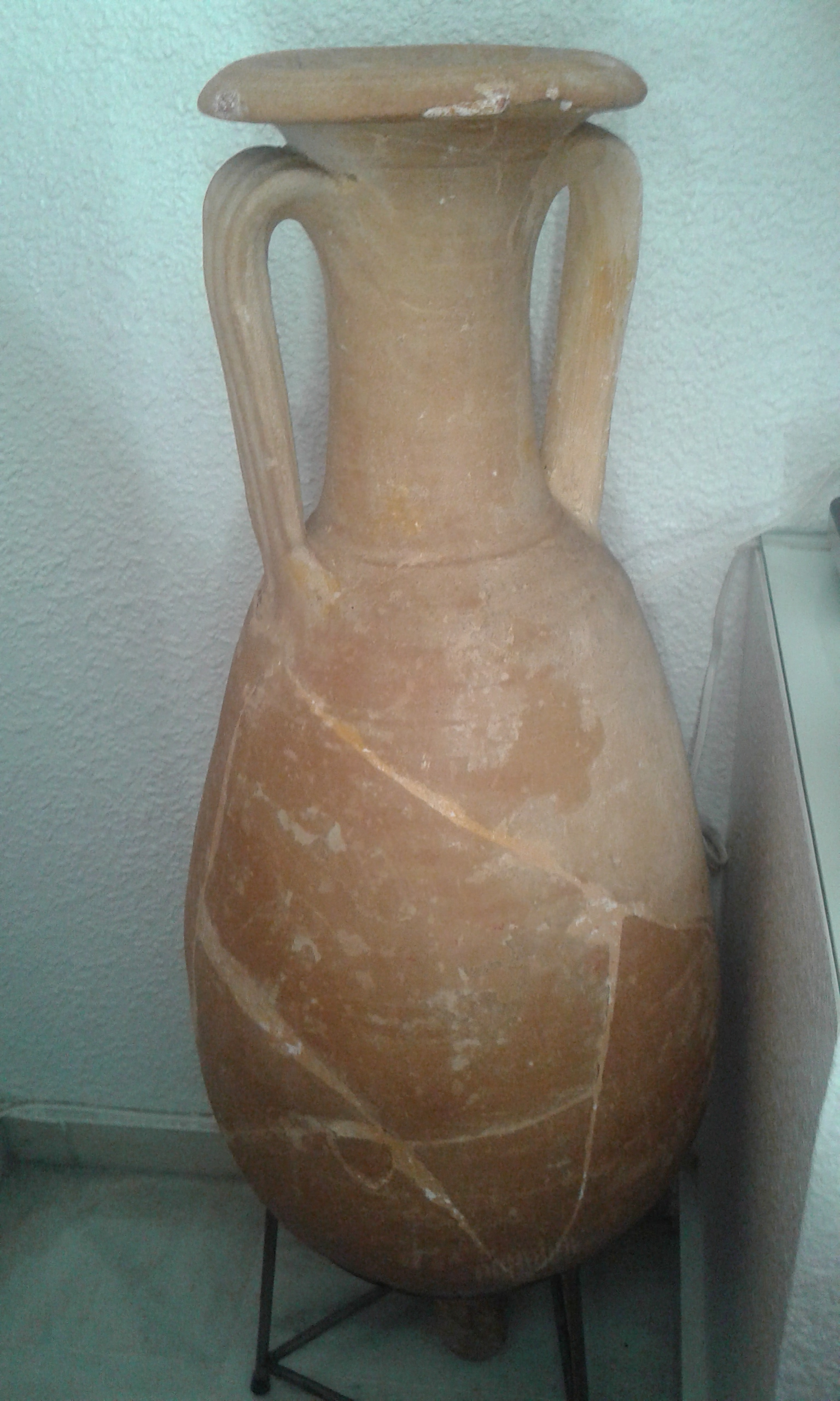 Fotografía de un ánfora romana restaurada. Procedente de colección privada.